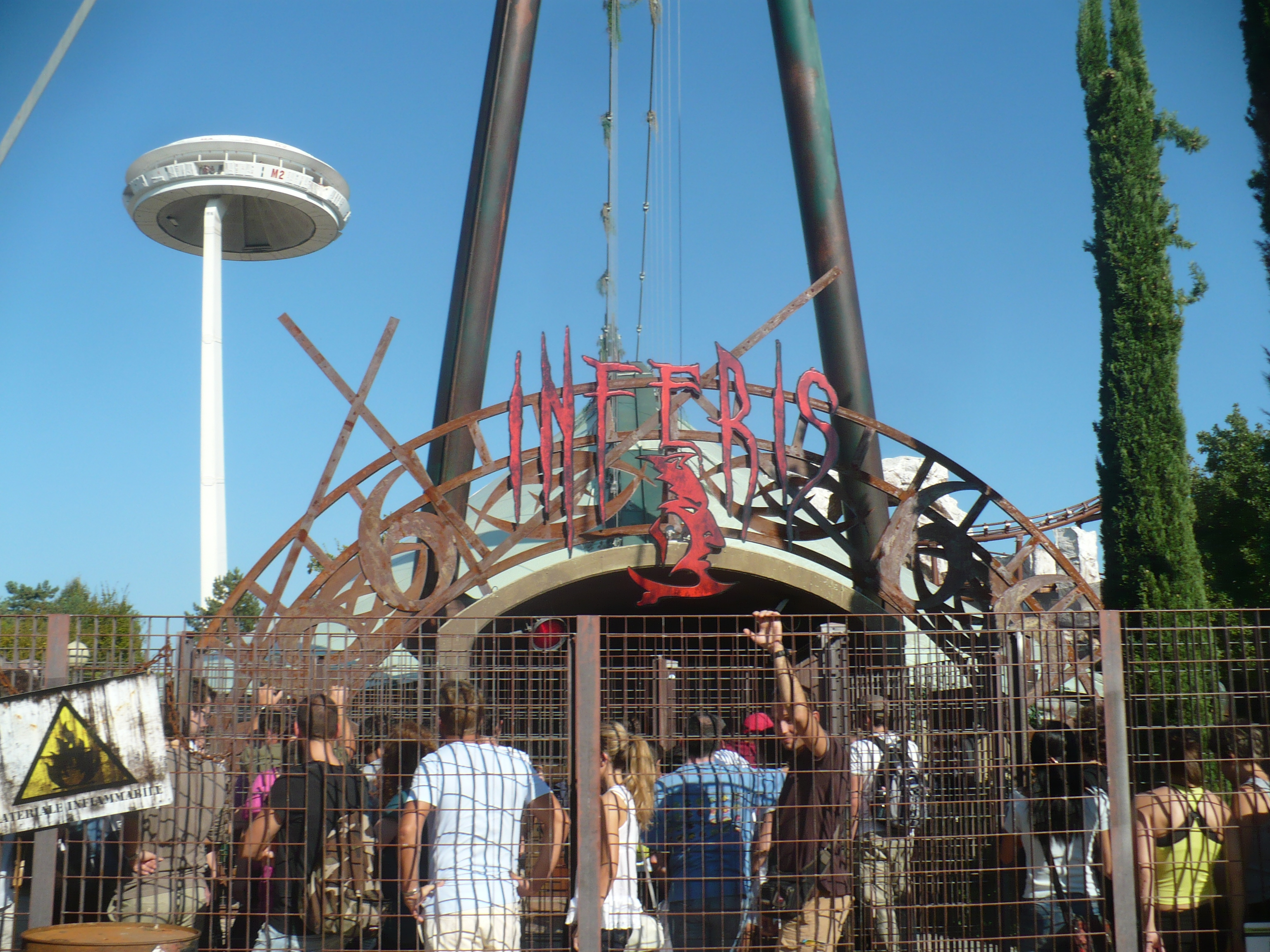 Il walk through horror Inferis di Gardaland.